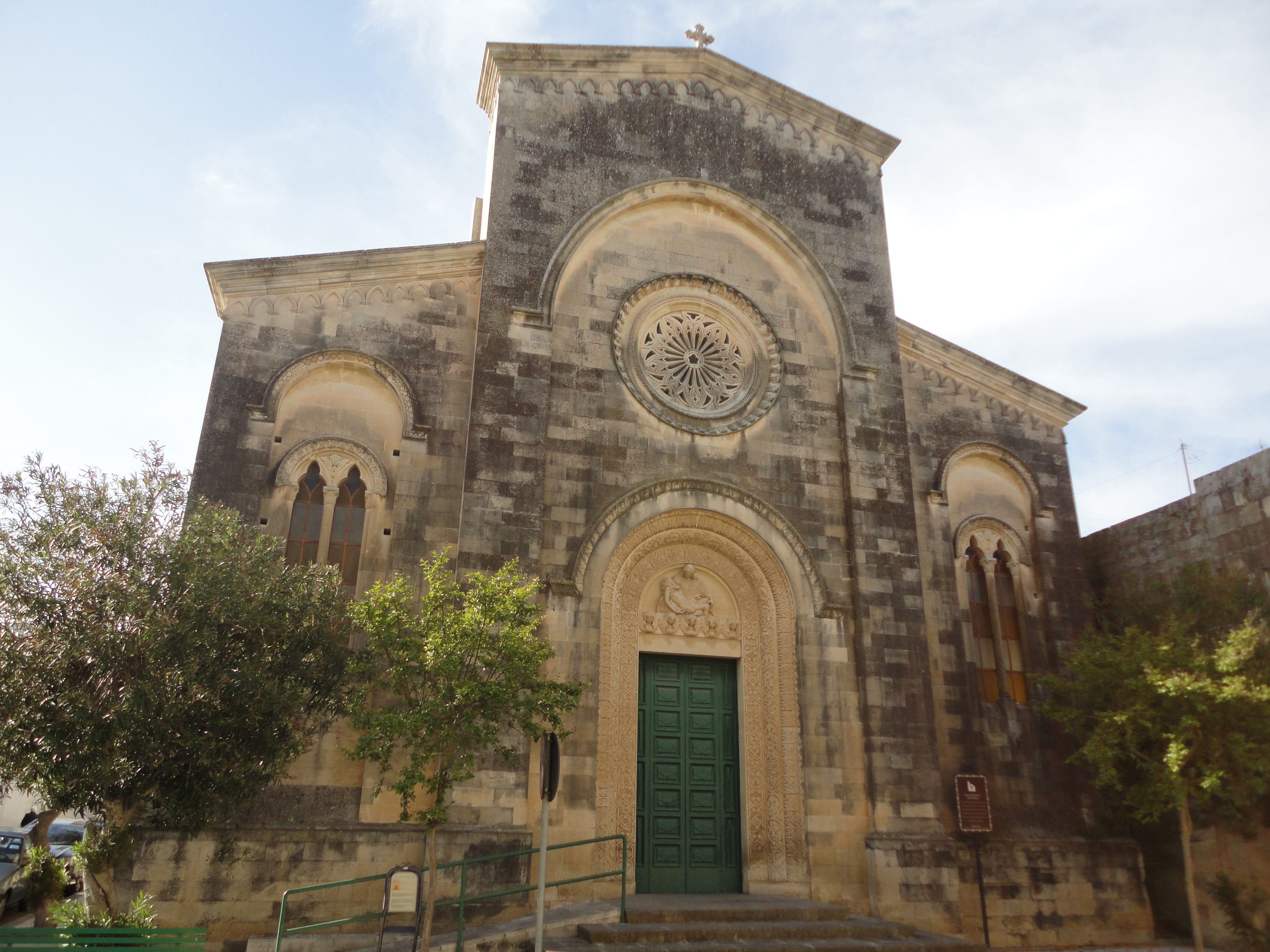 Chiesa dell'Addolorata Corigliano d'Otranto, Lecce